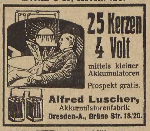 Reklame für elektrische Beleuchtung in der Zeitschrift "die Woche", Jahrgang 21, Heft 1, Seite 33. Digitalisat der Elbinger Bibliothek